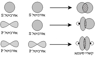 קשרי סיגמא